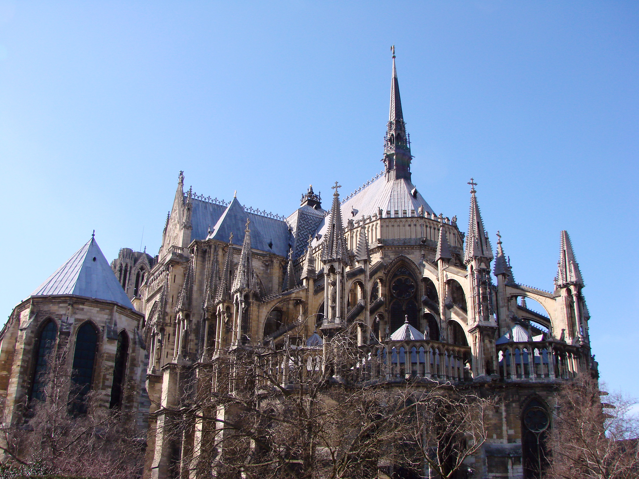 Vue du chevet de la cathédrale de Reims